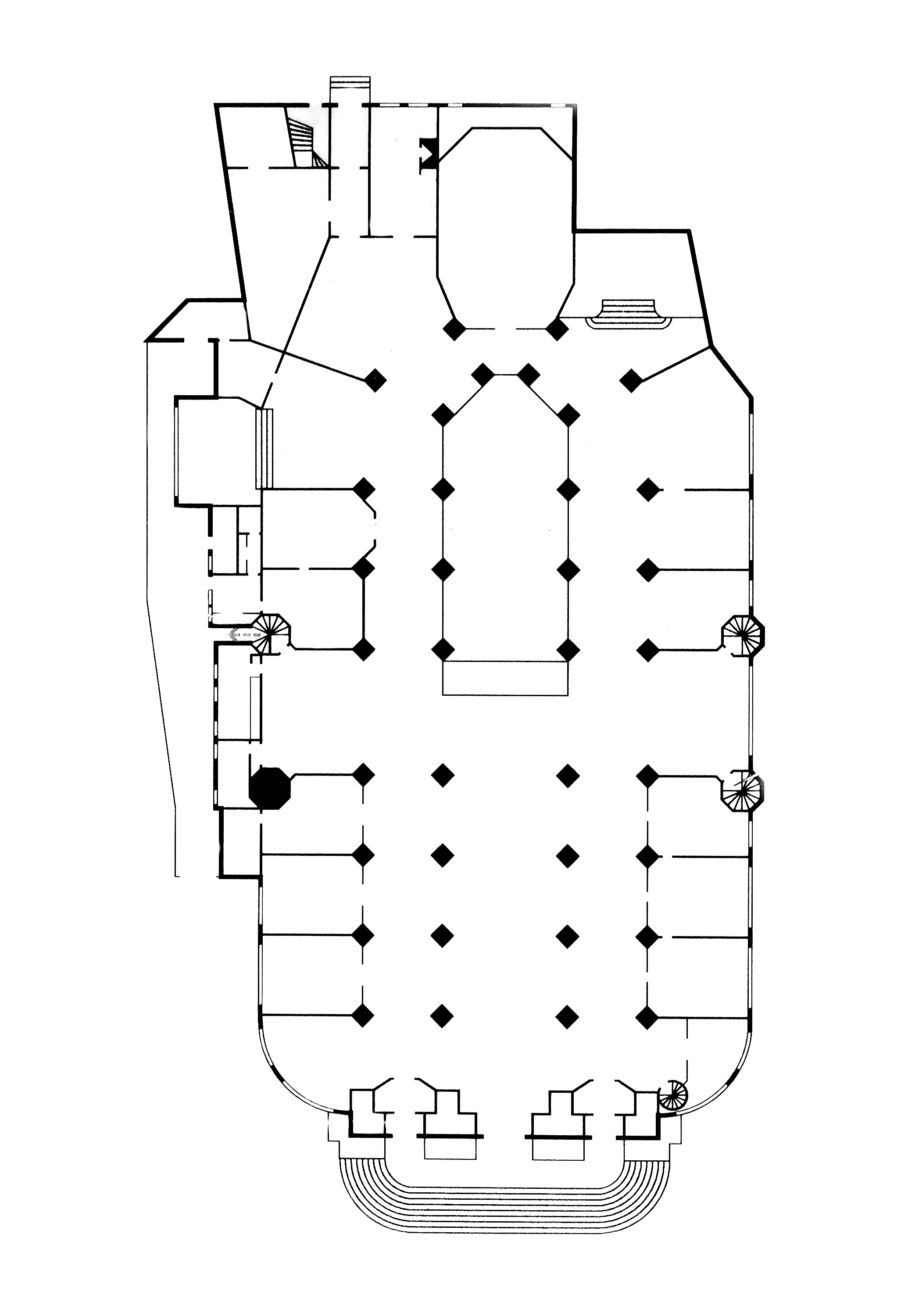 Plan de l'église Saint-Gervais-Saint-Protais d'après le plan affiché dans l'église - Paris IV